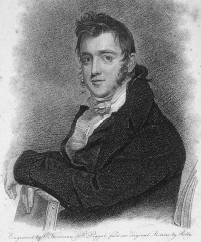 Lithografie von John Syng Dorsey (1783–1818)